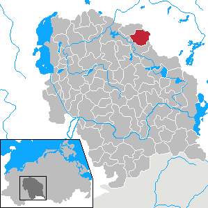 Mustin in Mecklenburg-Vorpommern - District Parchim